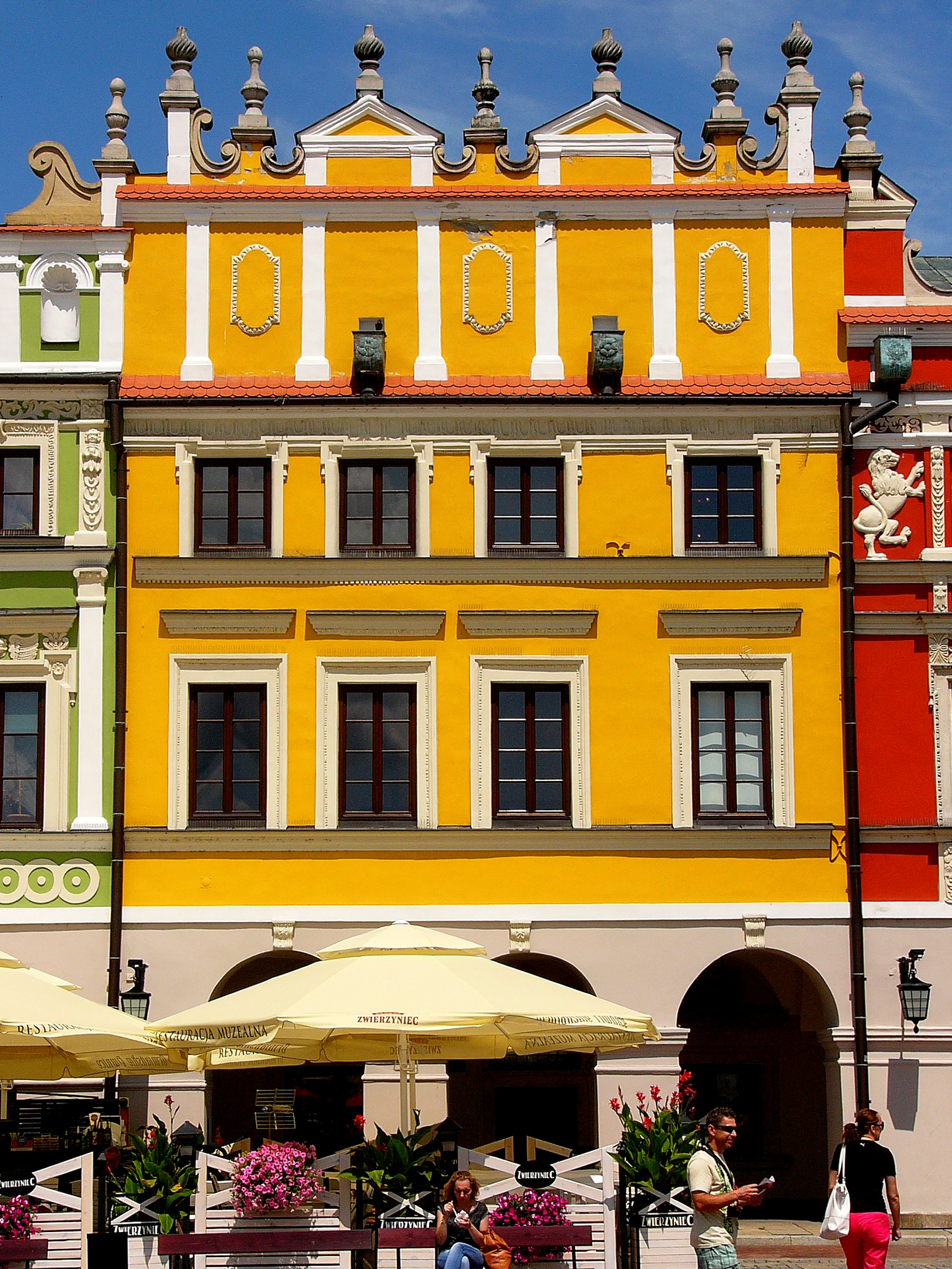 Zamość, Kamienica "Rudomiczowska" (1 poł. XVII w., XVIII-XX w.)